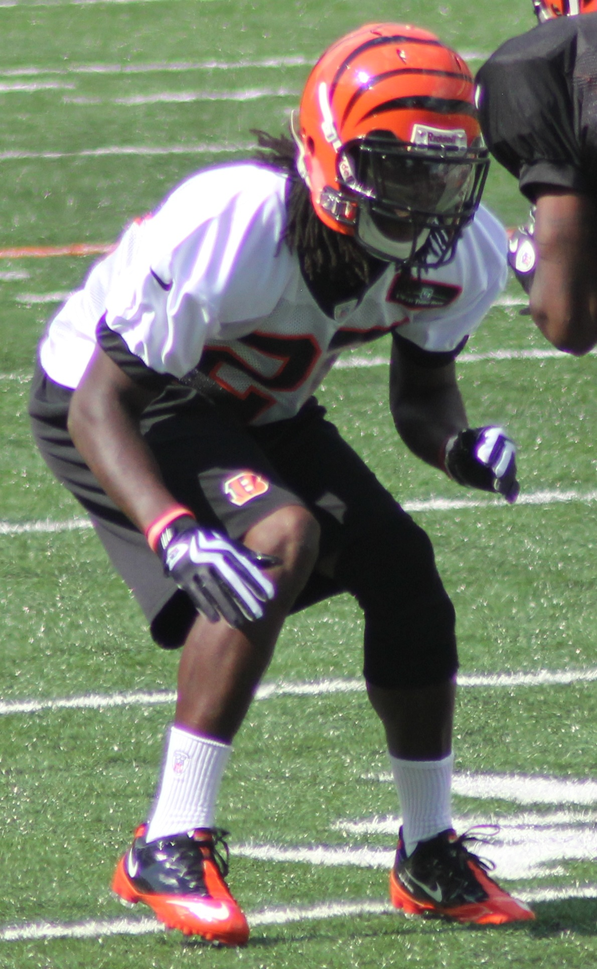 Brandon Tate vs. Dre Kirkpatrick